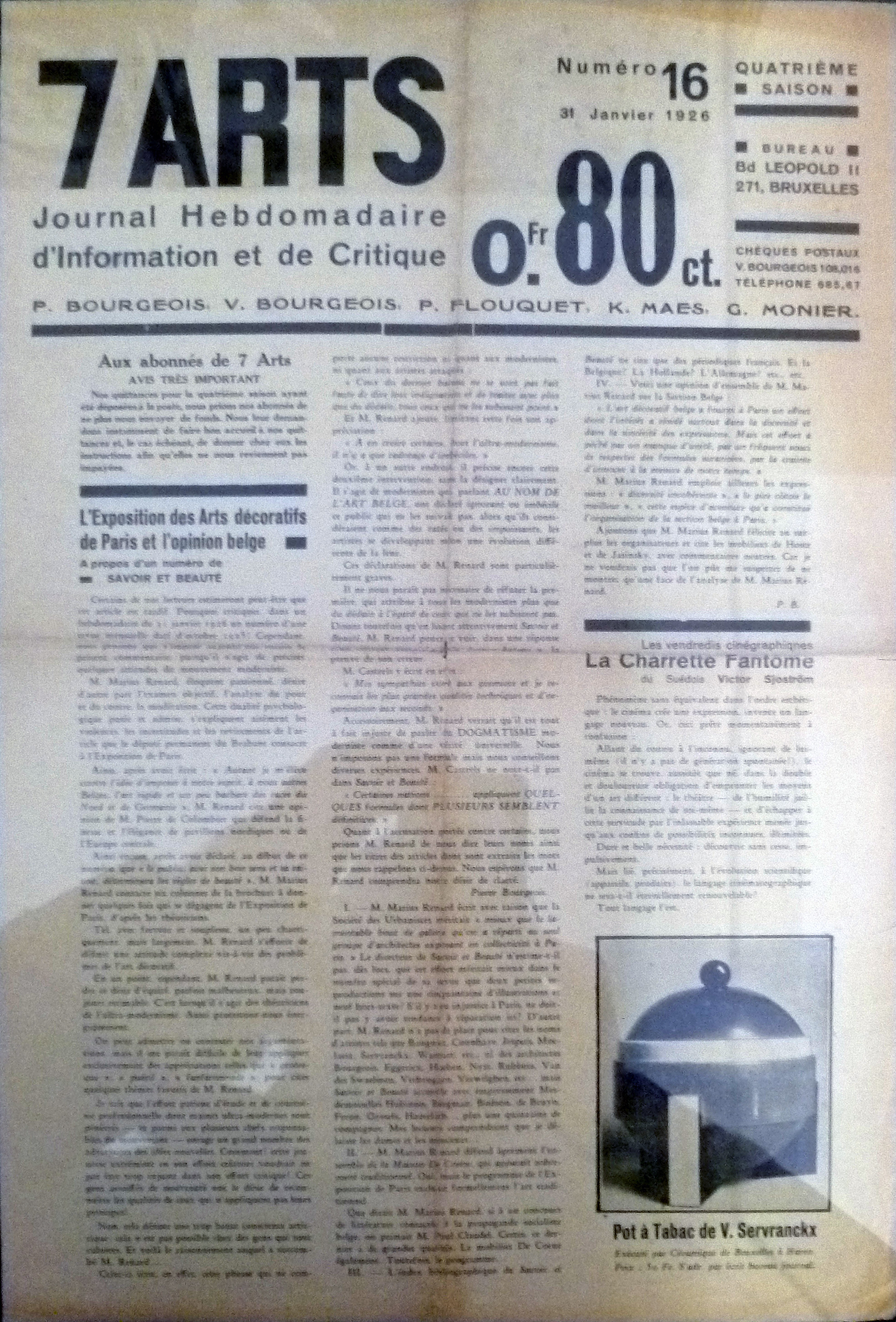 Belgisch kunsttijdschrift "7 Arts" (1926) met afbeelding van een theepot door Victor Servranckx